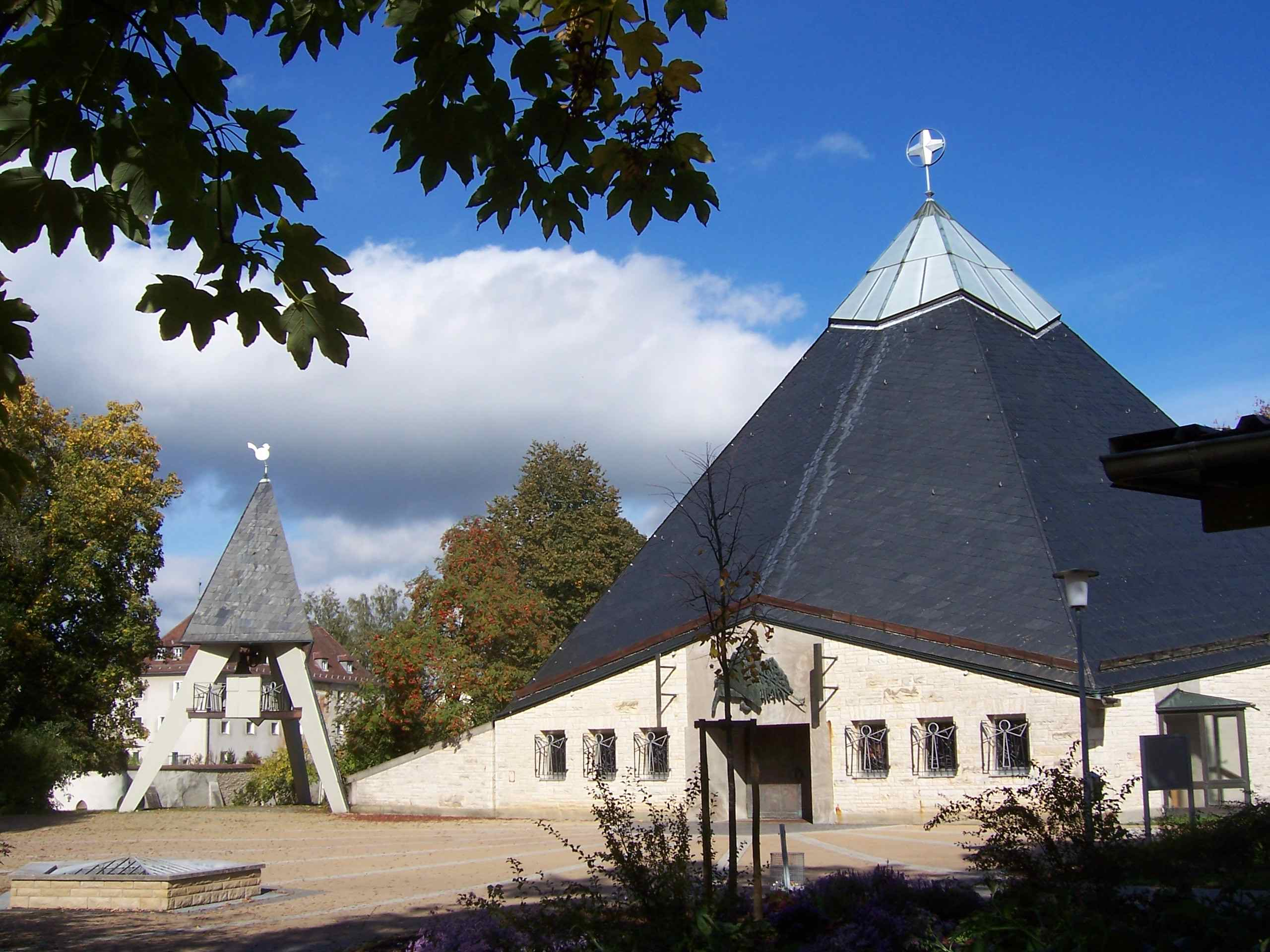 Polsingen Kirche Zum Guten Hirten